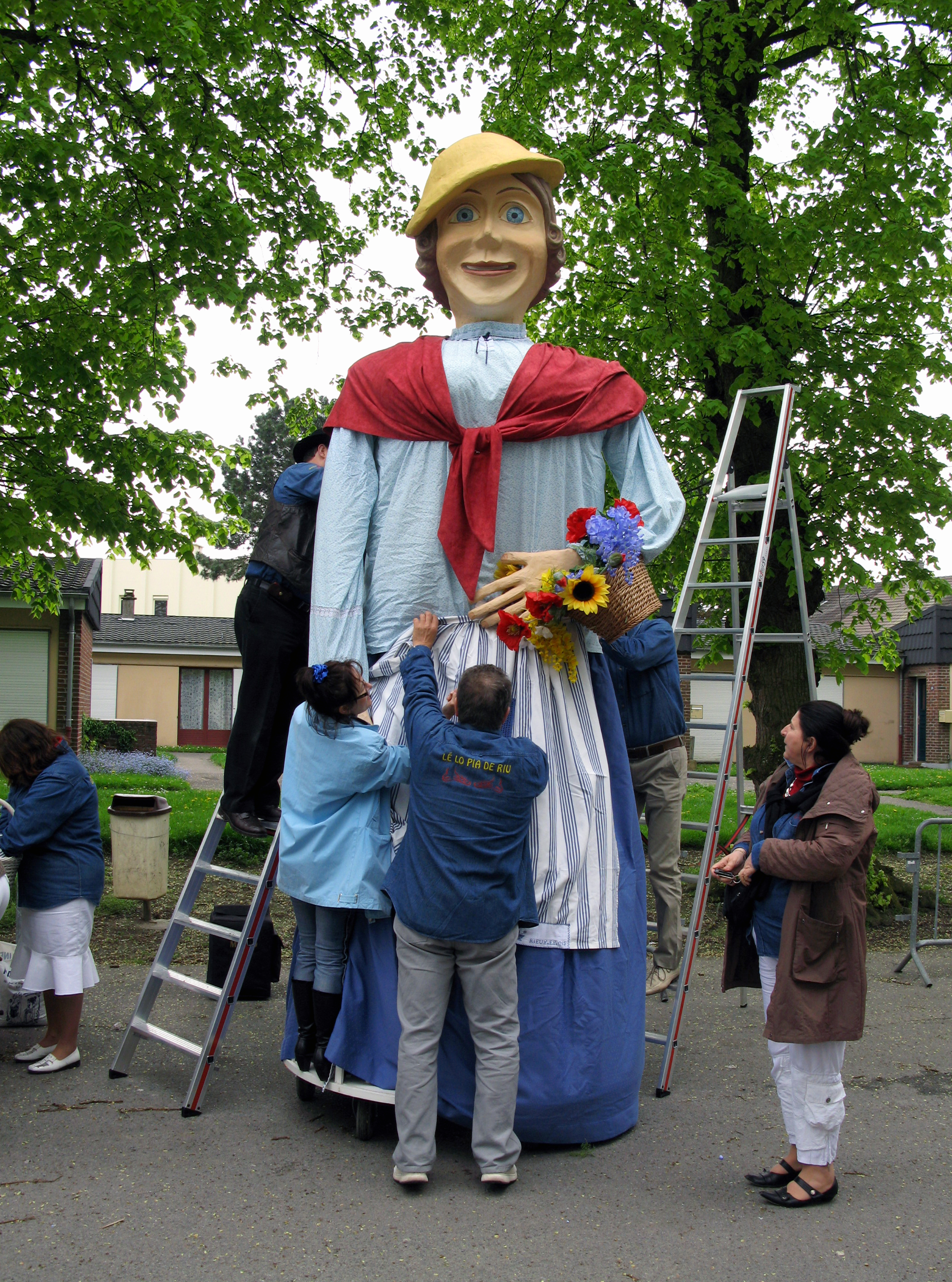 Ham (Somme, France) - Animation festive au centre-ville, un dimanche de printemps. Derrière l'Office de Tourisme (non loin des vestiges du Château). Avant la parade, vers 14 heures, les géants de procession sont assemblés, costumés et regroupés pour être alignés. Les accompagnateurs de « Binette » terminent son habillage. .